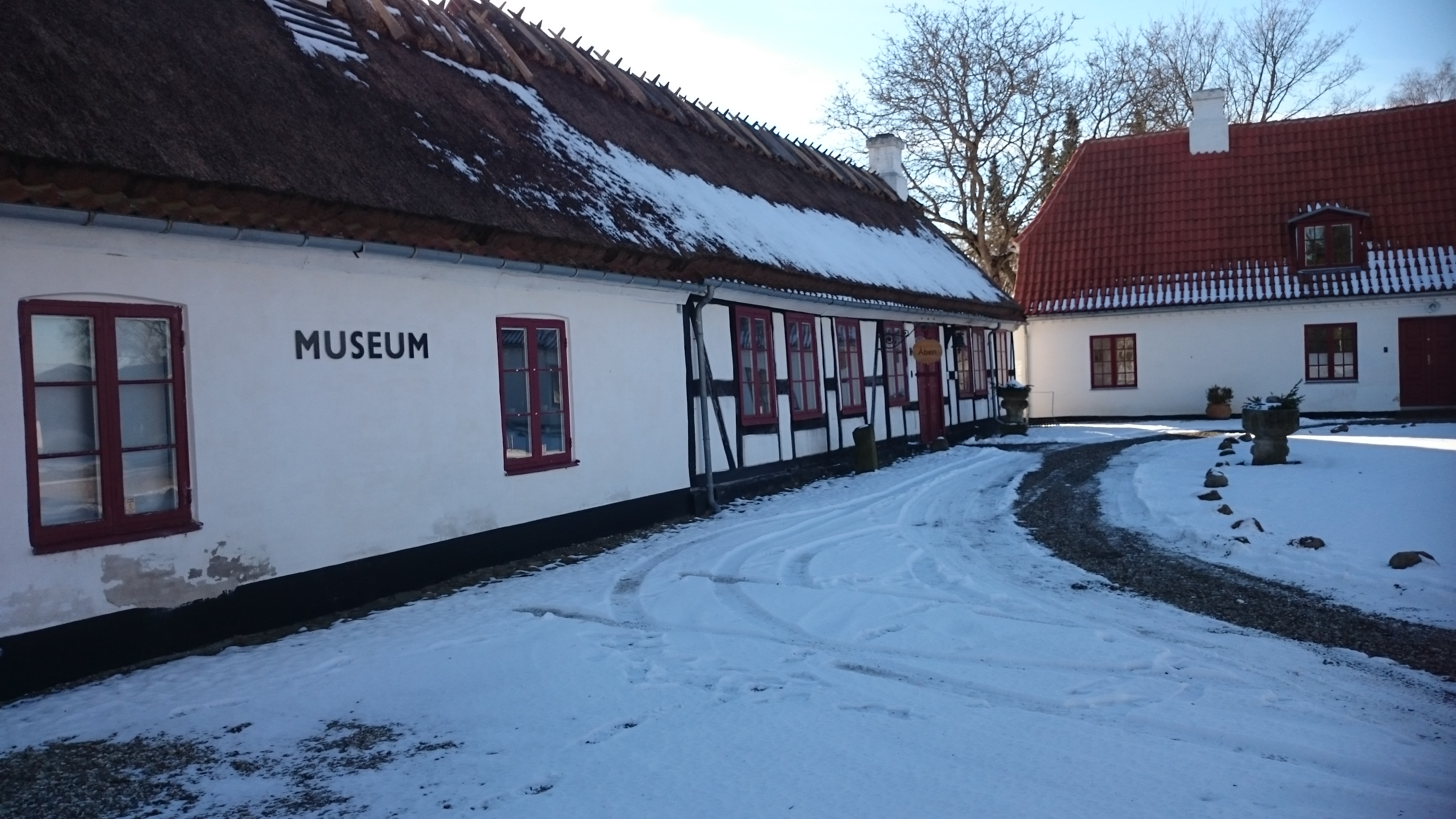 Udstillingsbygning, en del af Rudersdal Museer